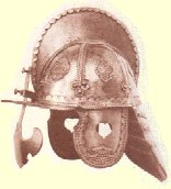 szyszk husarski